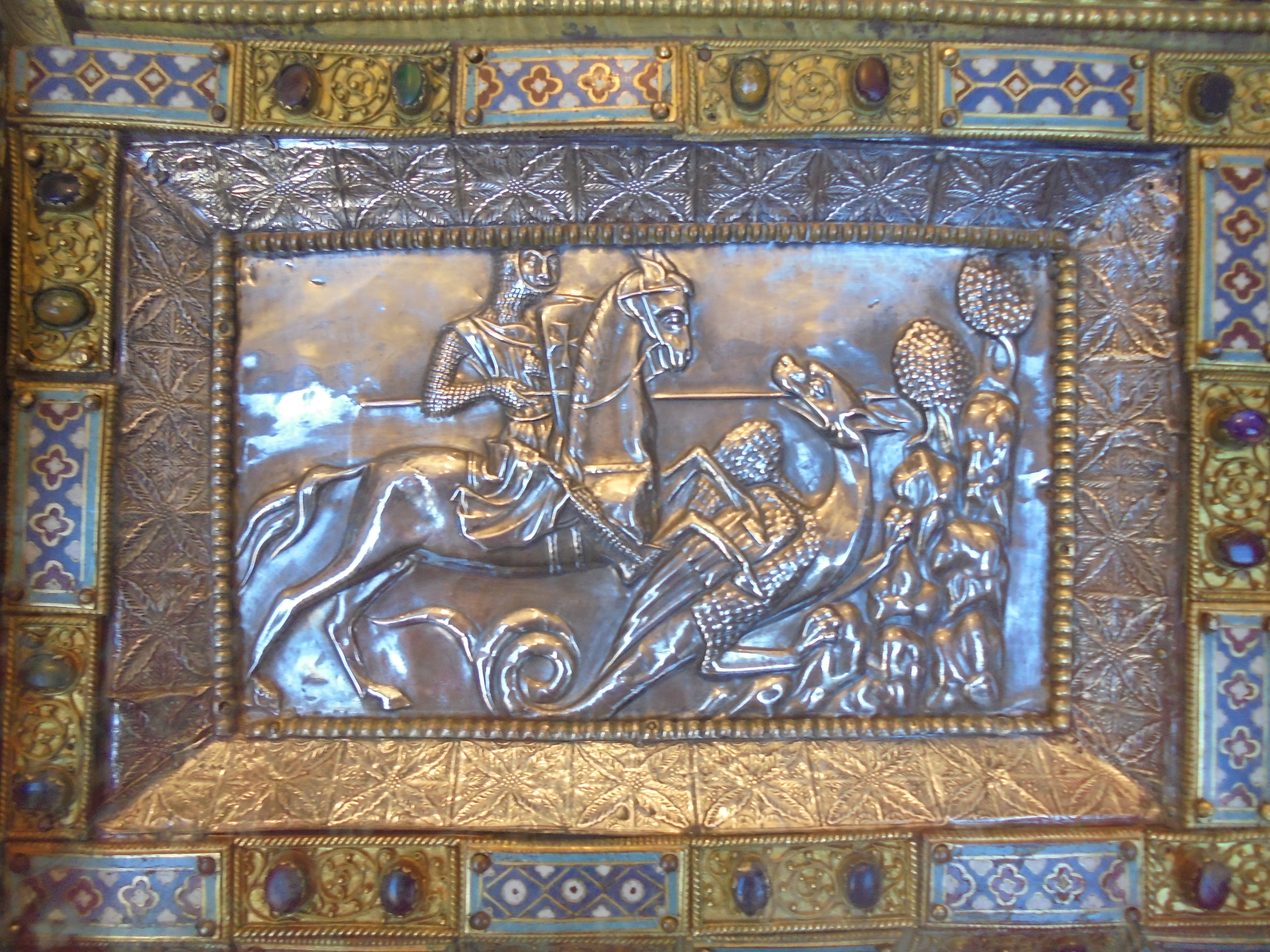 Première scène de la bâtière de Saint Georges de la châsse d'Amay, réalisé vers 1245-1255. Classé comme trésor de la Communauté Française depuis le 23 Novembre 2010.